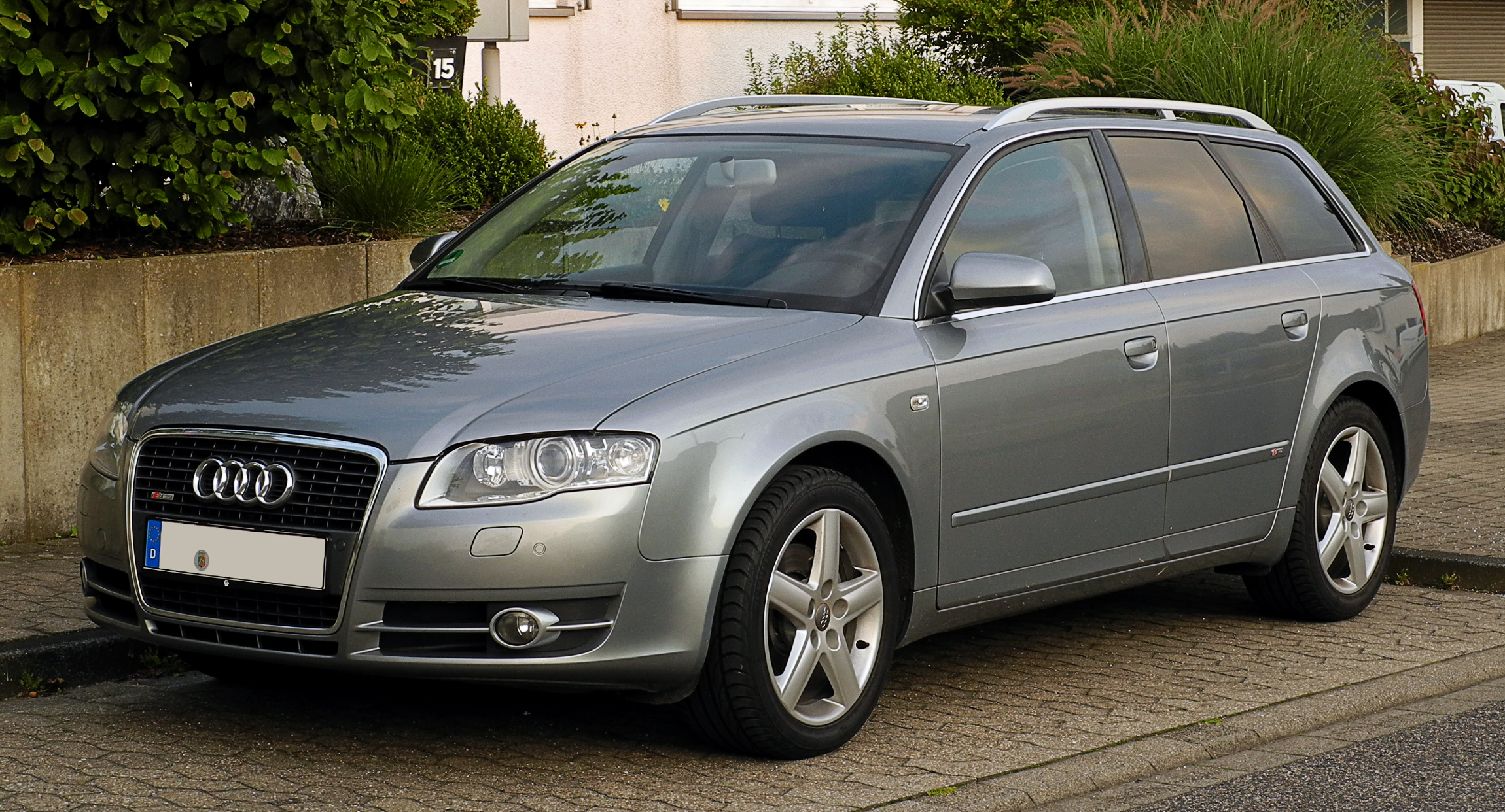 Audi A4 Avant TDI S-line (B7)